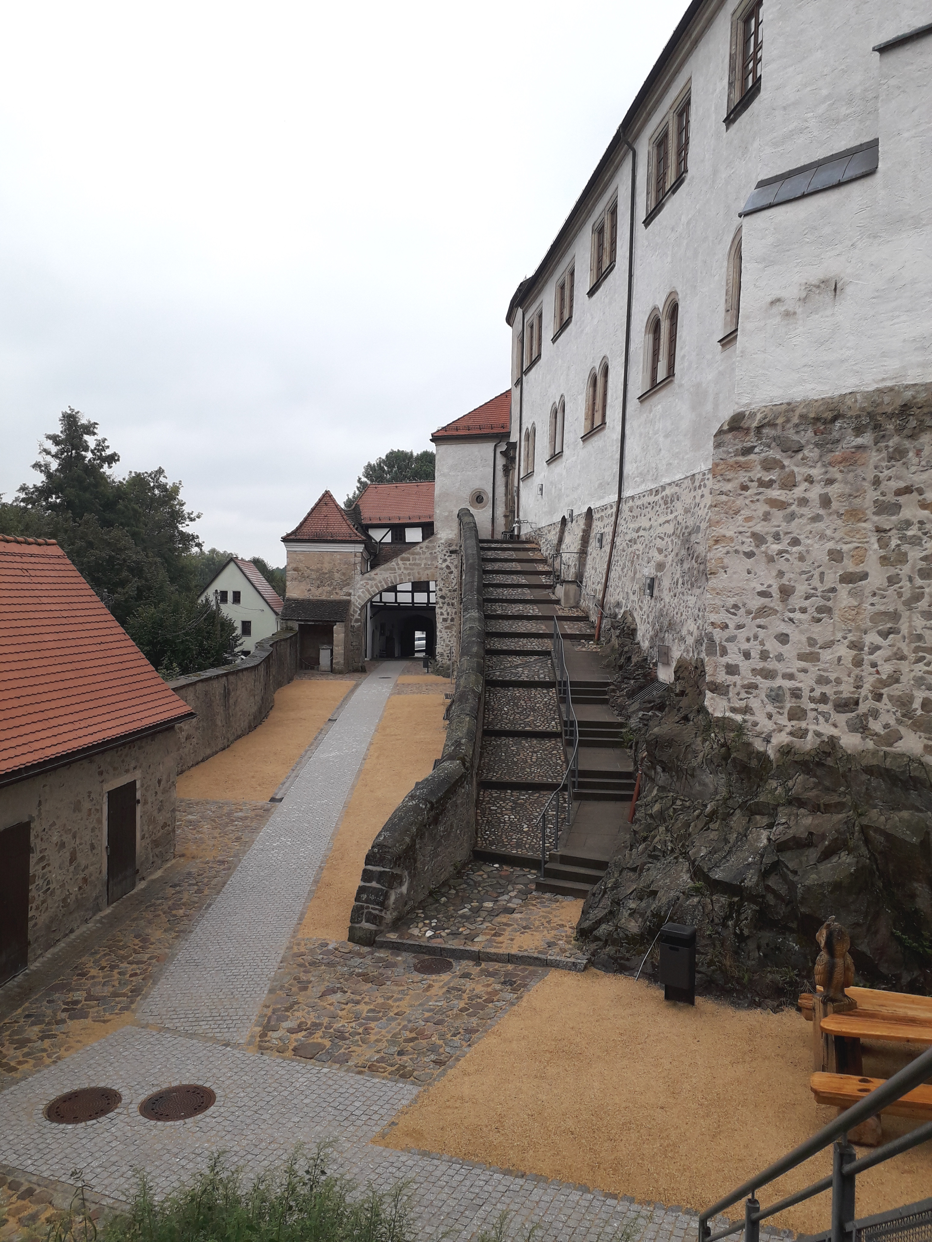 Unterer Schlosshof, Schloss Klippenstein Radeberg nach Sanierung 2018, mit Reittreppe